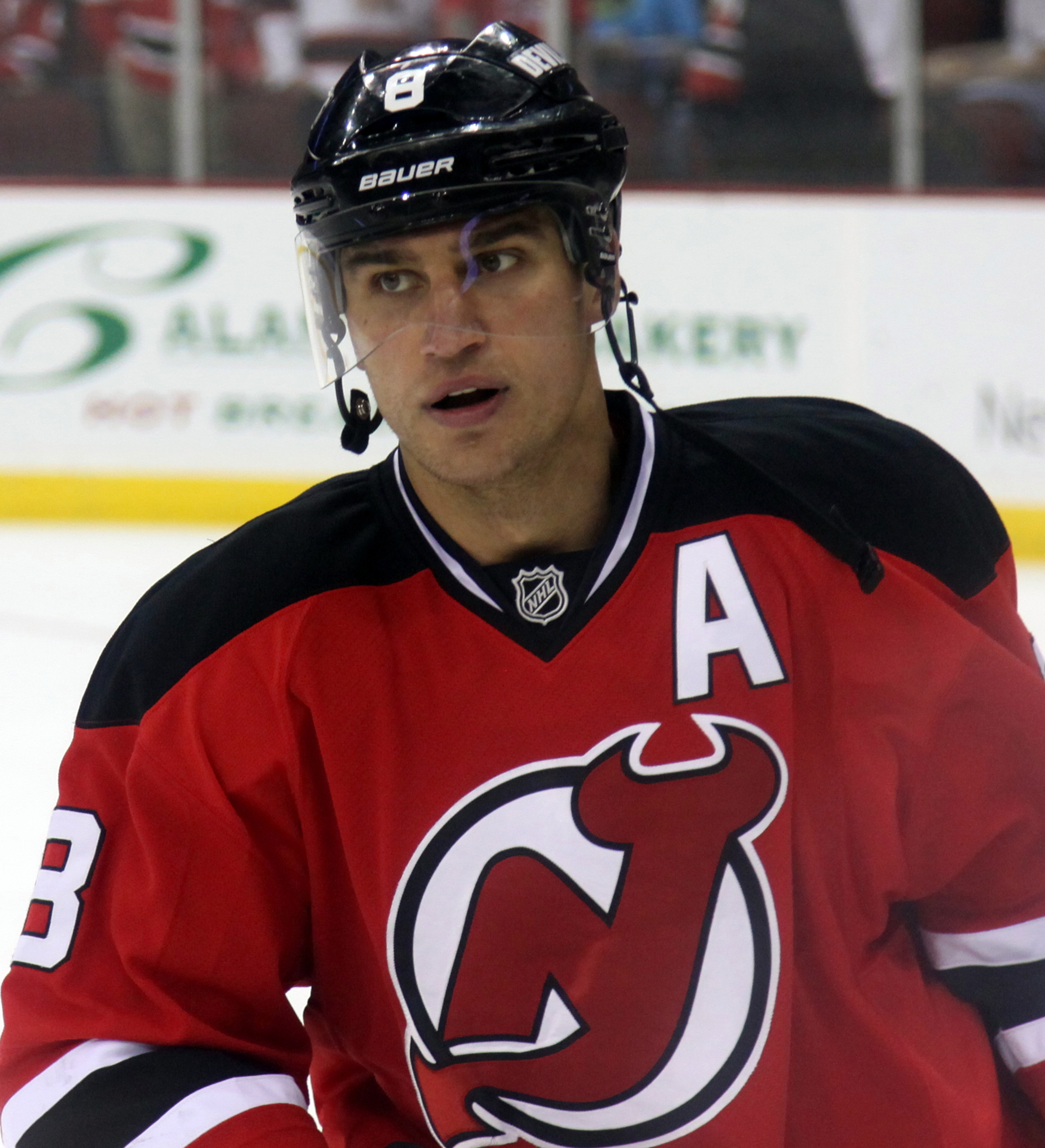 Zubrus in 2014.